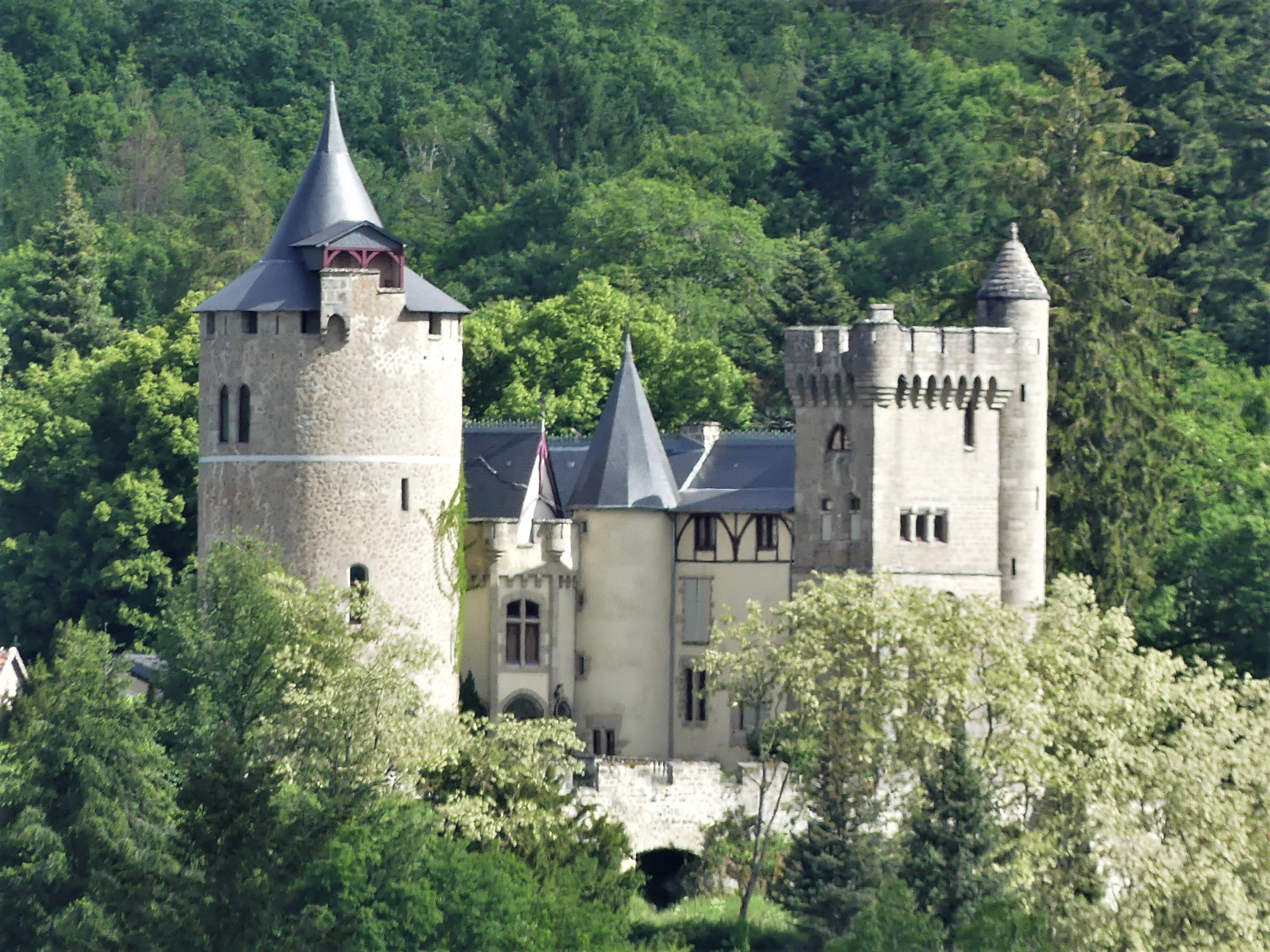 Le château du Fôt, Saint-Amand, Creuse, France.